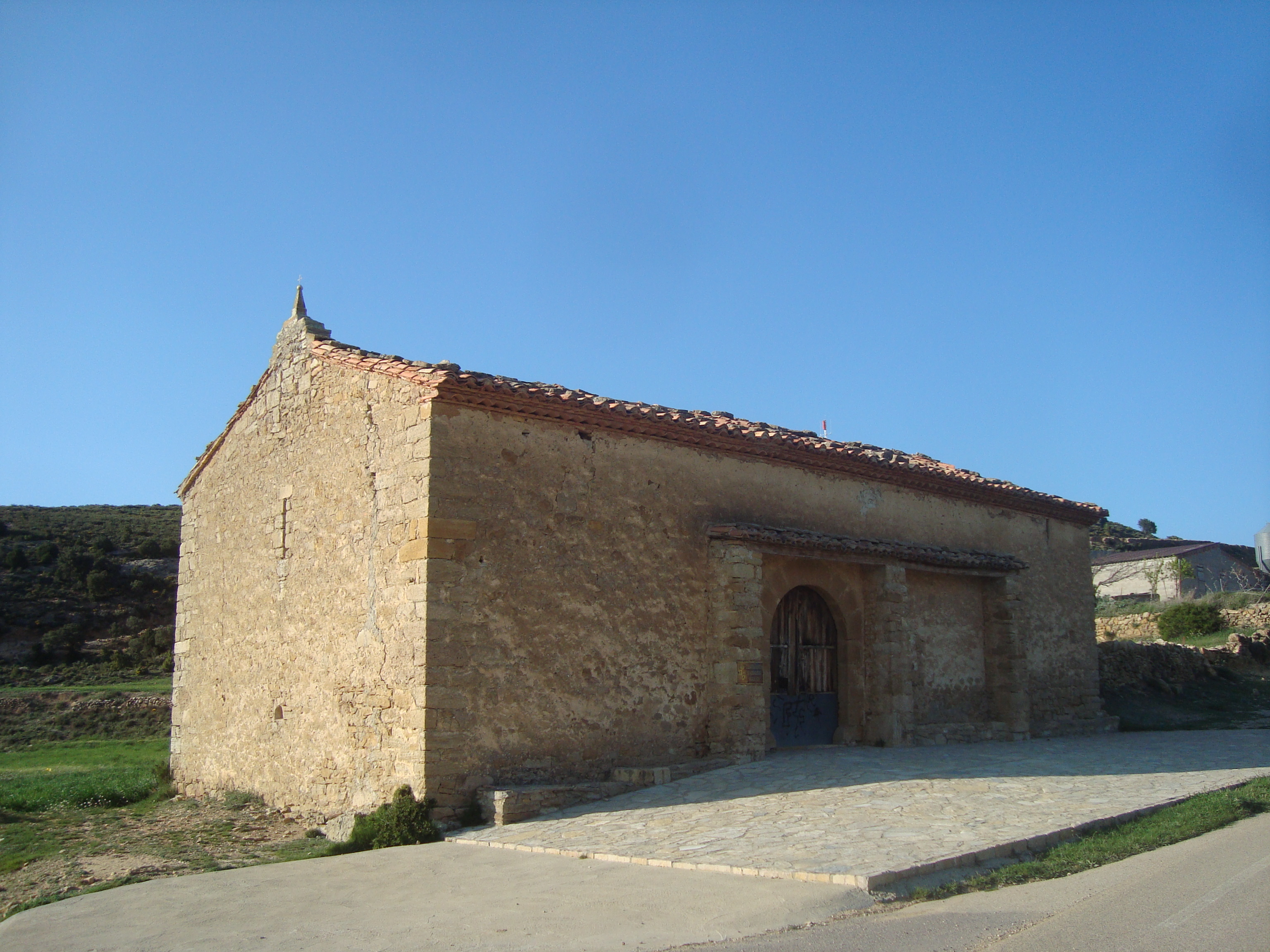 Ermita de la Magdalena (Olocau del Rei) 01.083-007.